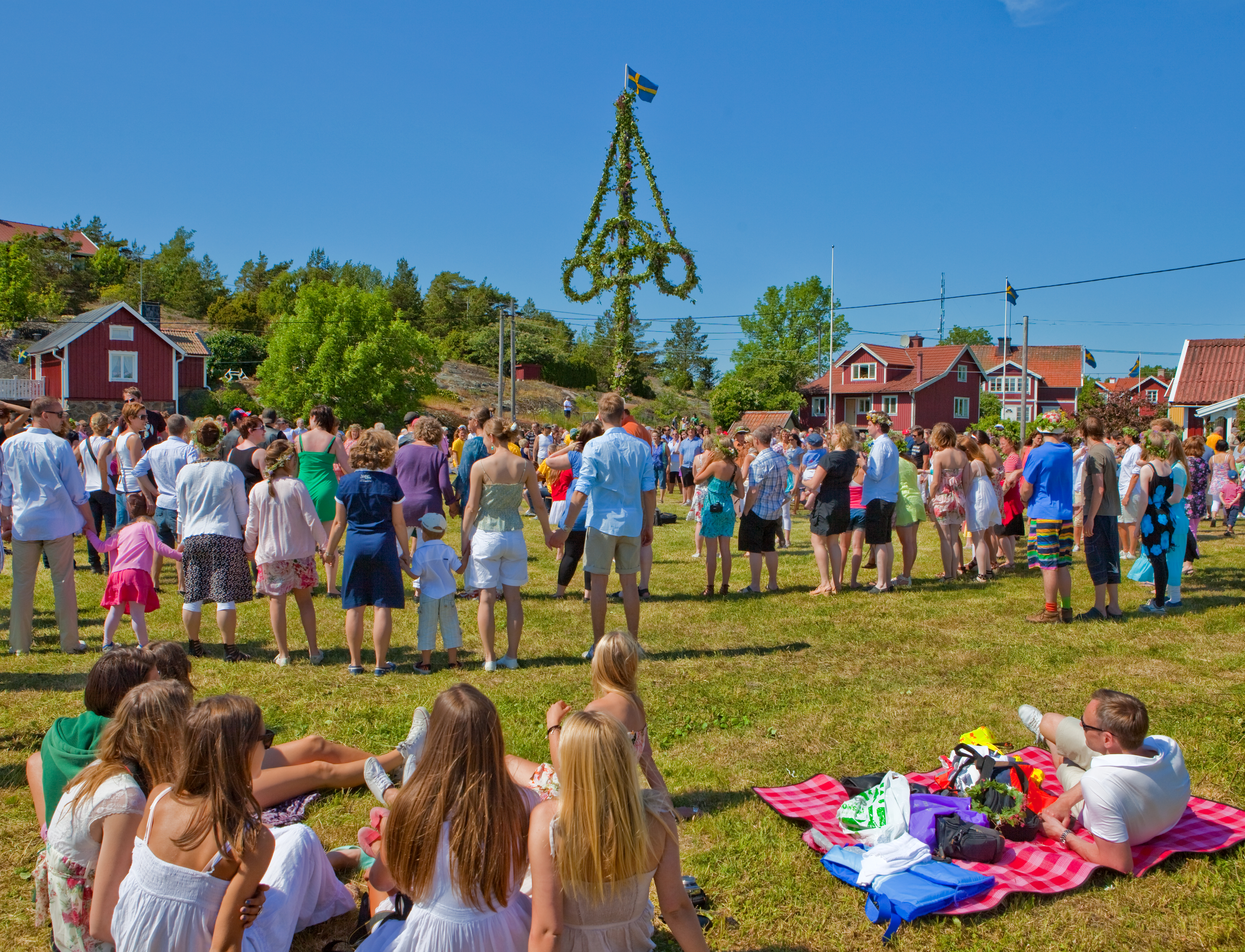 Midsummer Möja 2010